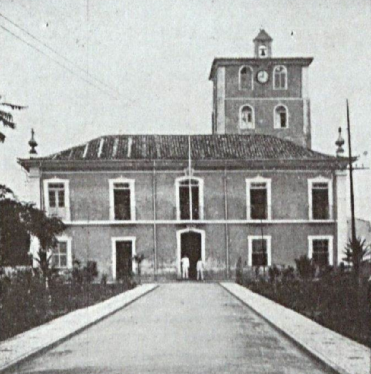 Legenda da foto (na grafia original):Asylo São João de Deus - Edificio central(Antiga casa de saúde do Dr. Antonio José Alves)No texto intitulado "Hospicio São João de Deus", assinado por Eutychio Leal, tem-se a seguinte informação histórica:(...)Em 18 de julho de 1869 a Assembléa provincial votava a lei n. 1.089, que autorisava o vice-presidente, Dr. Antonio Ladisláu Figueiredo Rocha, a comprar em hasta publica a Quinta da Boa Vista, (photographia vid.) propriedade e casa de saúde do Dr. Antonio José Alves (pae do mavioso poeta Castro Alves), cirurgião dos mais notaveis e professor de pathologia externa da Faculdade de Medicina.